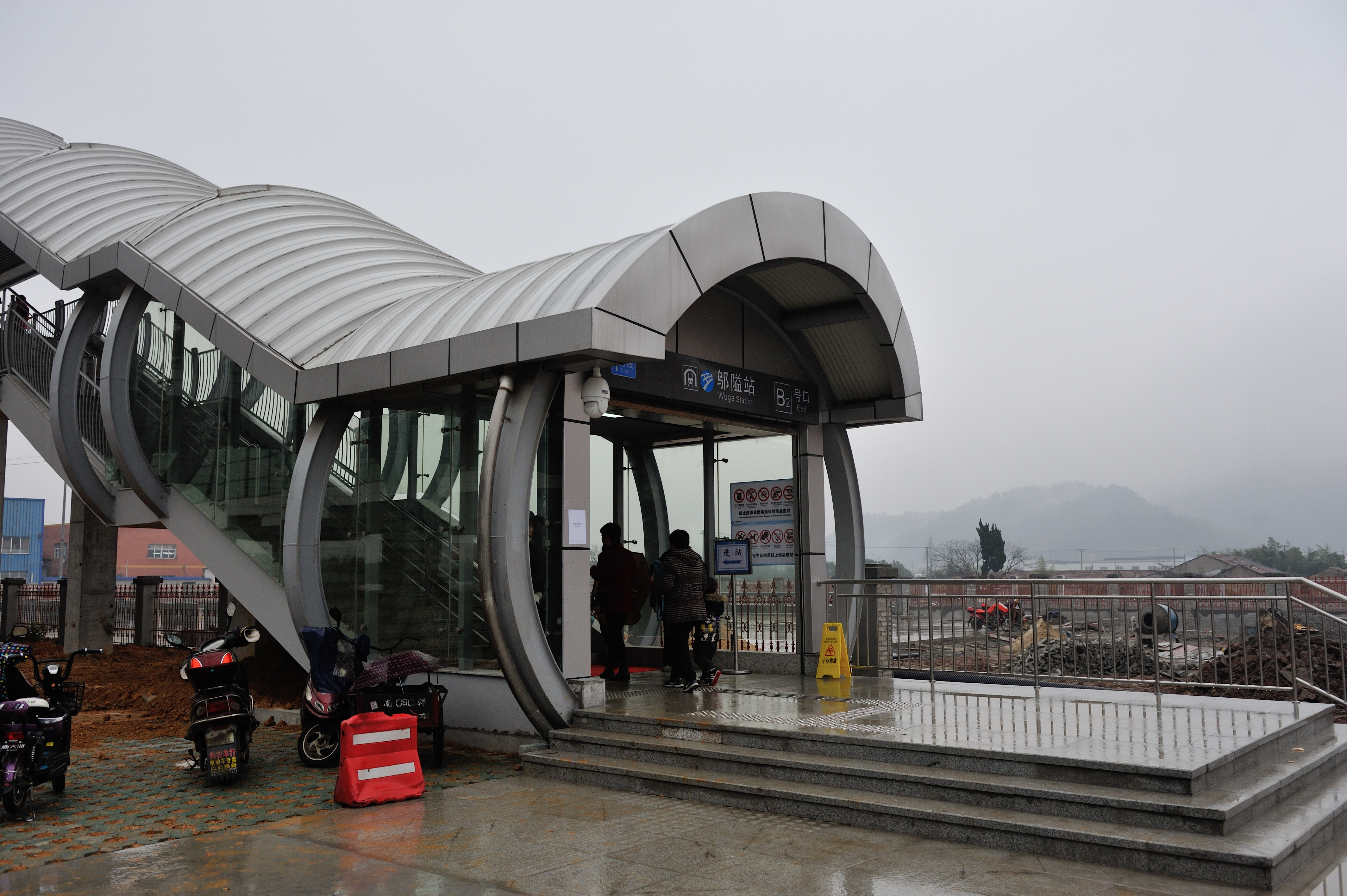 宁波轨道交通邬隘站